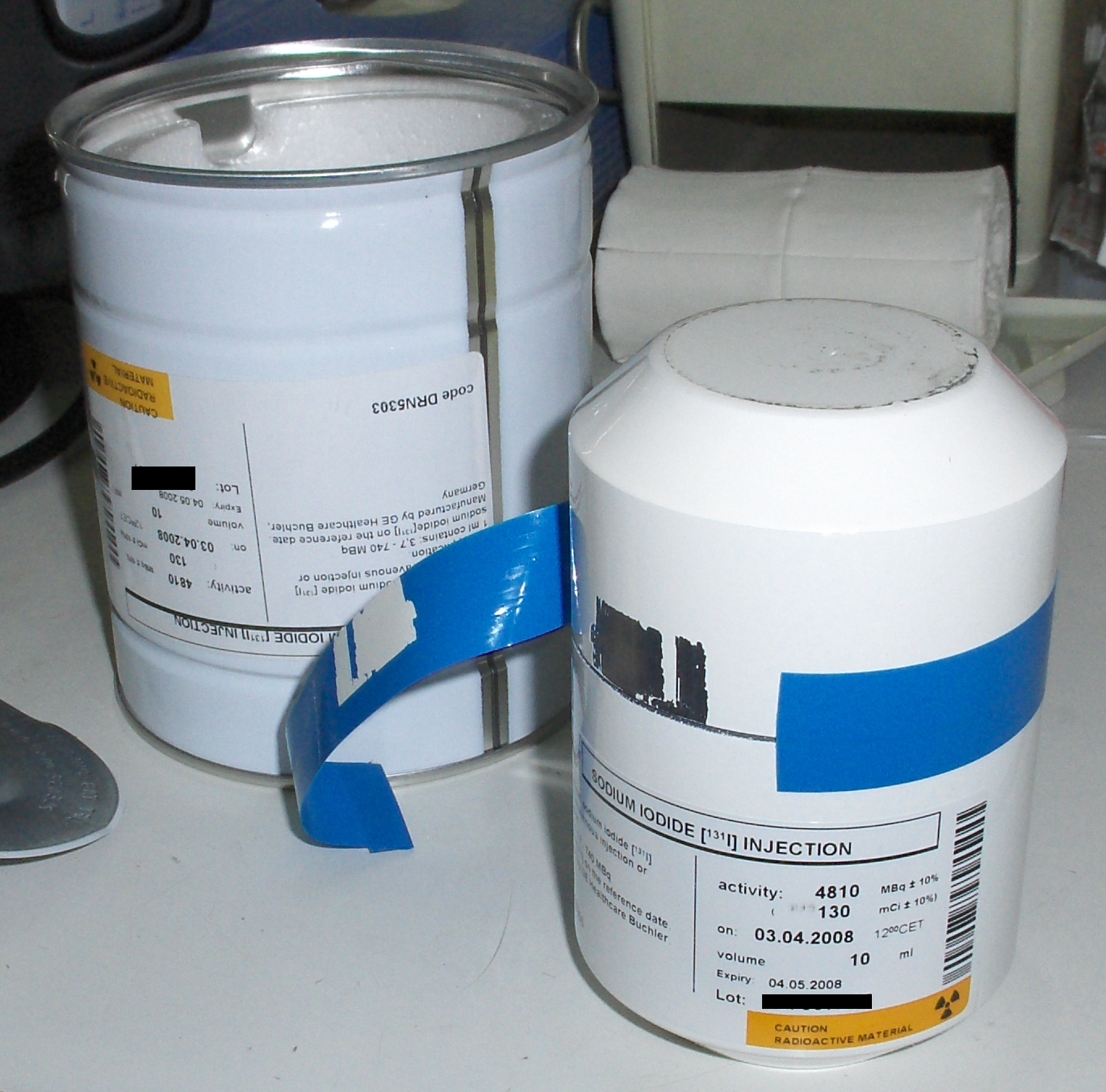 Bleibehälter (rechts) für flüssiges 131I-Natriumiodid, Höhe etwa 10 cm, und Umverpackung (links, Weißblech und Styropor); es fehlt die zweite Umverpackung (Pappe).